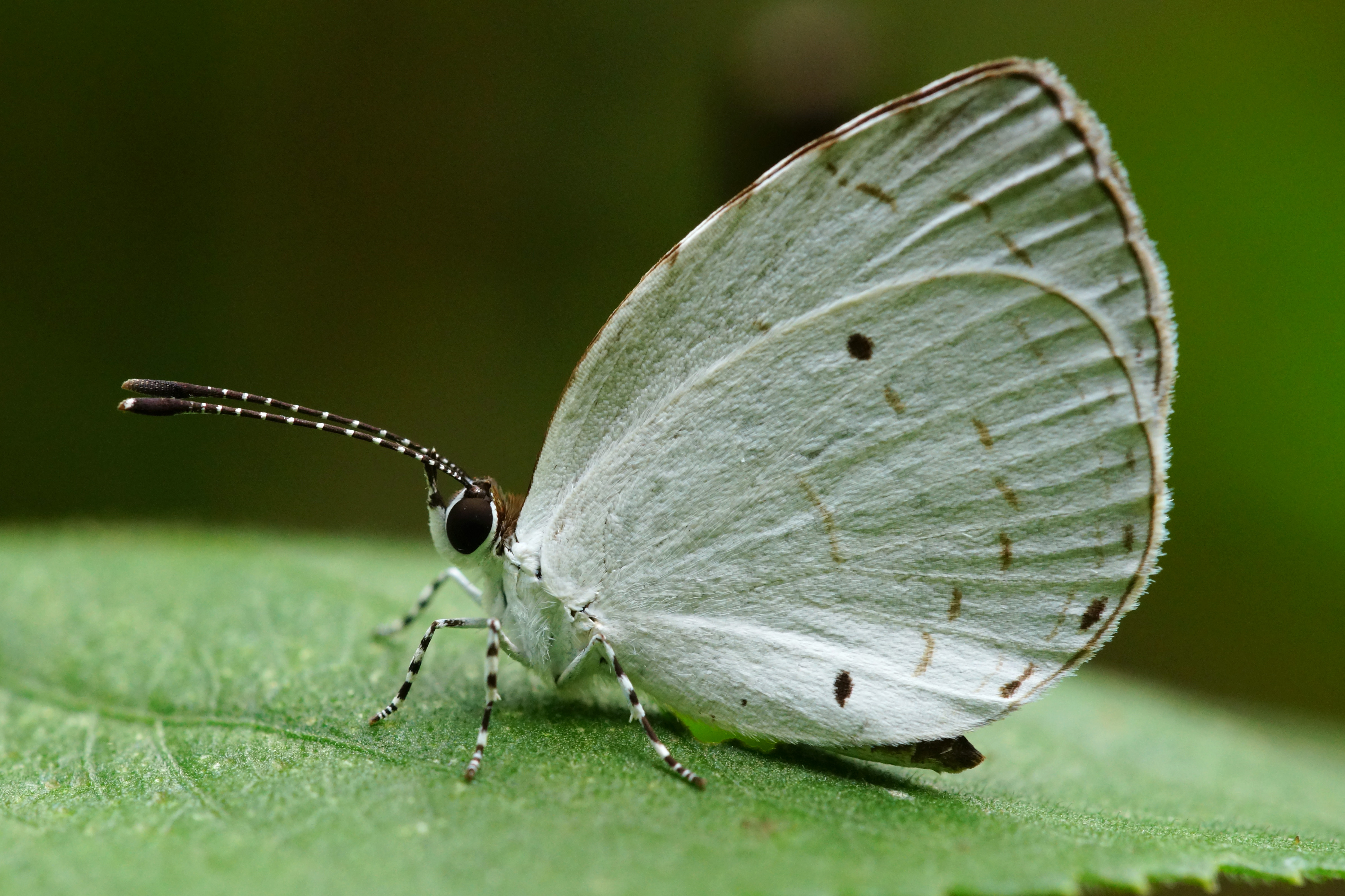 黑點灰蝶 Neopithecops zalmora